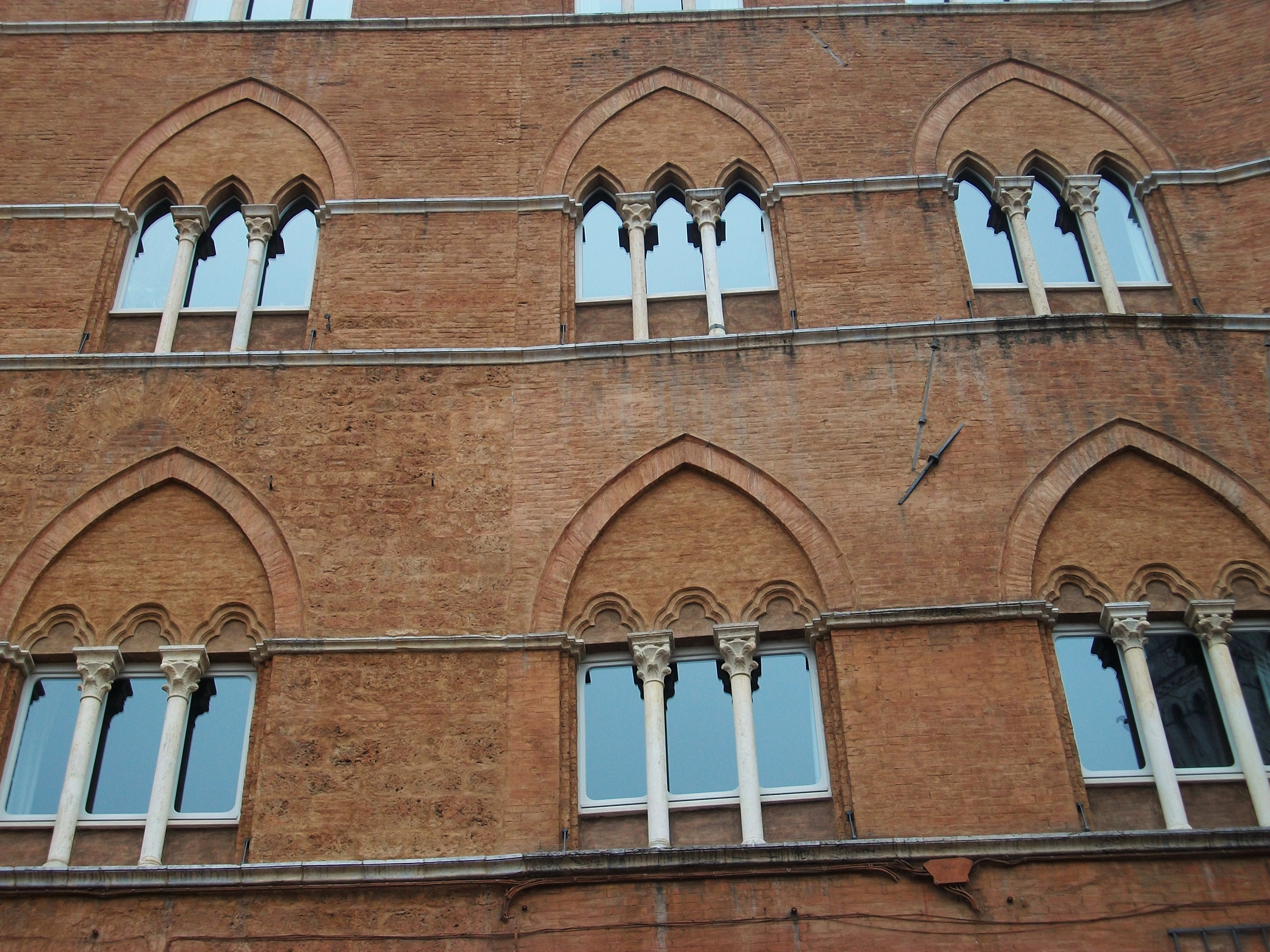 Finestres del Palau Sansedoni de Siena.